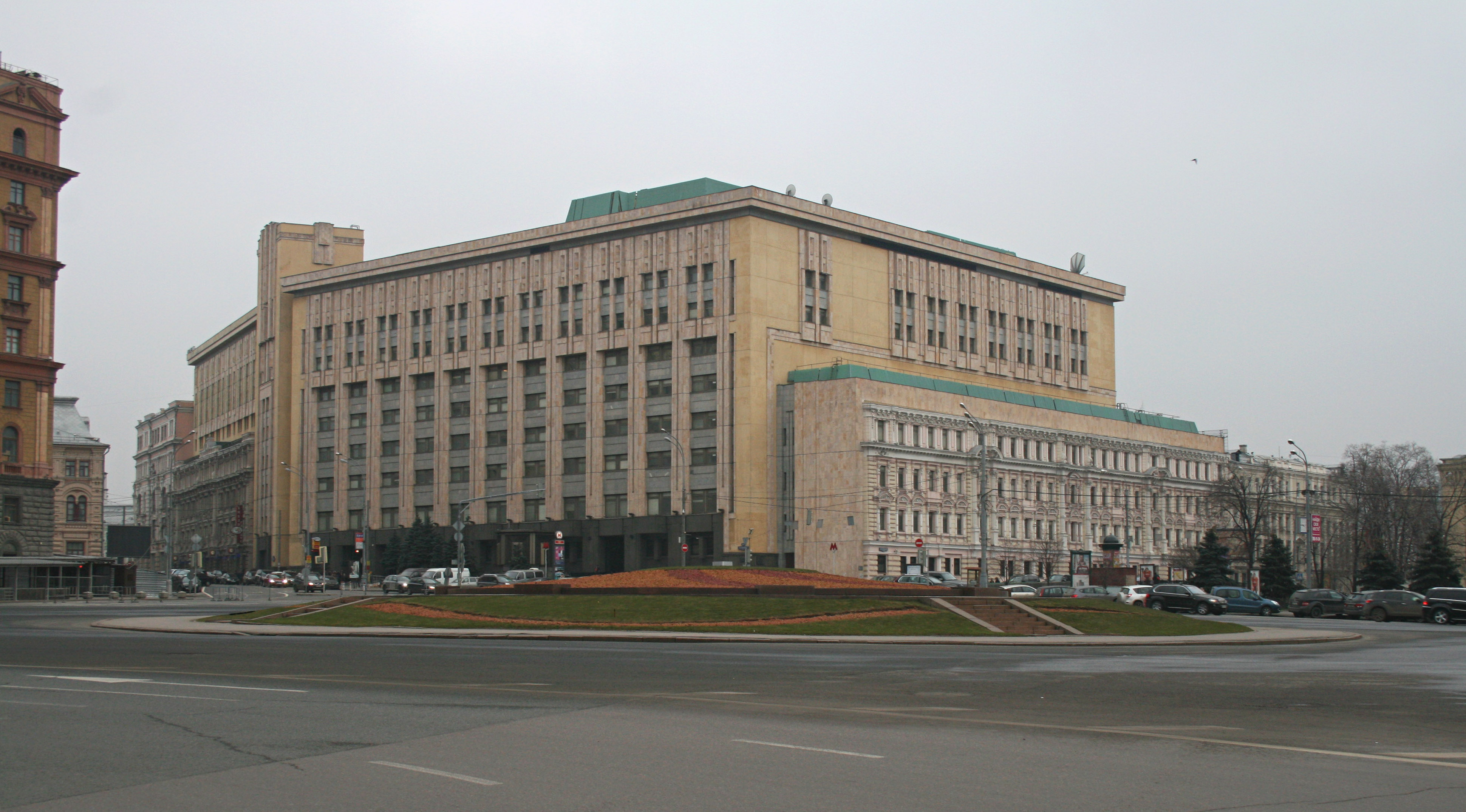 Лубянская площадь и здание вычислительного центра КГБ СССР (ранее дом Стахеева). Лубянский проезд, д. 3/6